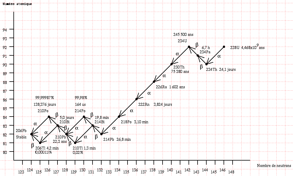 Série de désintégration de l'uranium 238. Sont indiqués sur la figure: le nombre de neutrons des isotopes, leur numéro atomique, leur période radiocative ainsi que le type de particule α ou β émise lors de la désintégration. Le rapport d'embranchement est aussi indiqué quand il est relevant. Le rapport d'embranchement indique ici le pourcentage de chances que l'isotope précédant a de se transformer en l'isotope qu'il qualifie. Nous pouvons voir que lors des transformations nécessaires pour passer de 238U à 206Pb, 8 particules alpha et 6 particules béta seront émises. La période radioactive des différents éléments de la chaîne varie de 164 μs pour le 214Po à 4,478x109 années pour le 238U. Le seul élément stable est le 206Pb. Les sources utilisées pour réaliser cette image sont les suivantes: tableau périodique et les descriptions des éléments concernés, Sources of Ionizing Radiation, URANIUM: A RADIOACTIVE CLOCK et Periodic Table of Elements: Bi - Bismuth Image faite par Dominique Michel avec xfig.